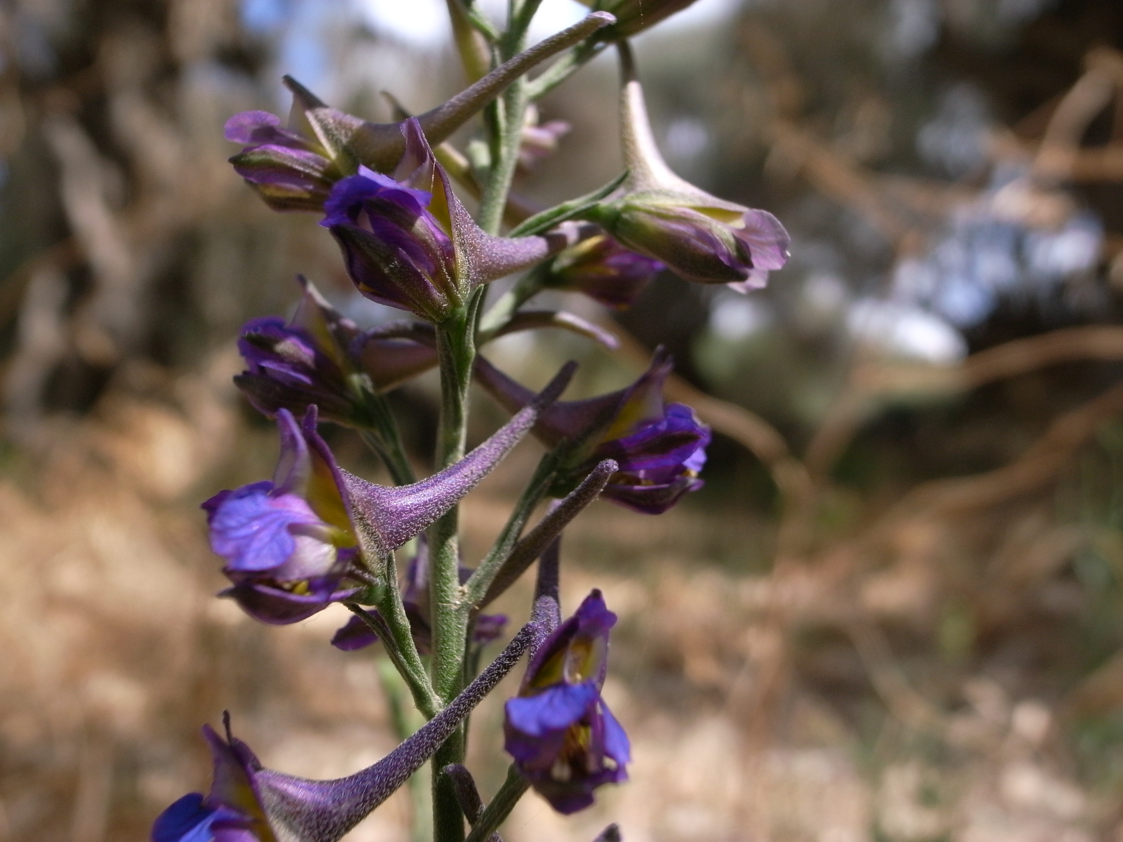 Delphinium halteratum, Wardija Ridge, Malta